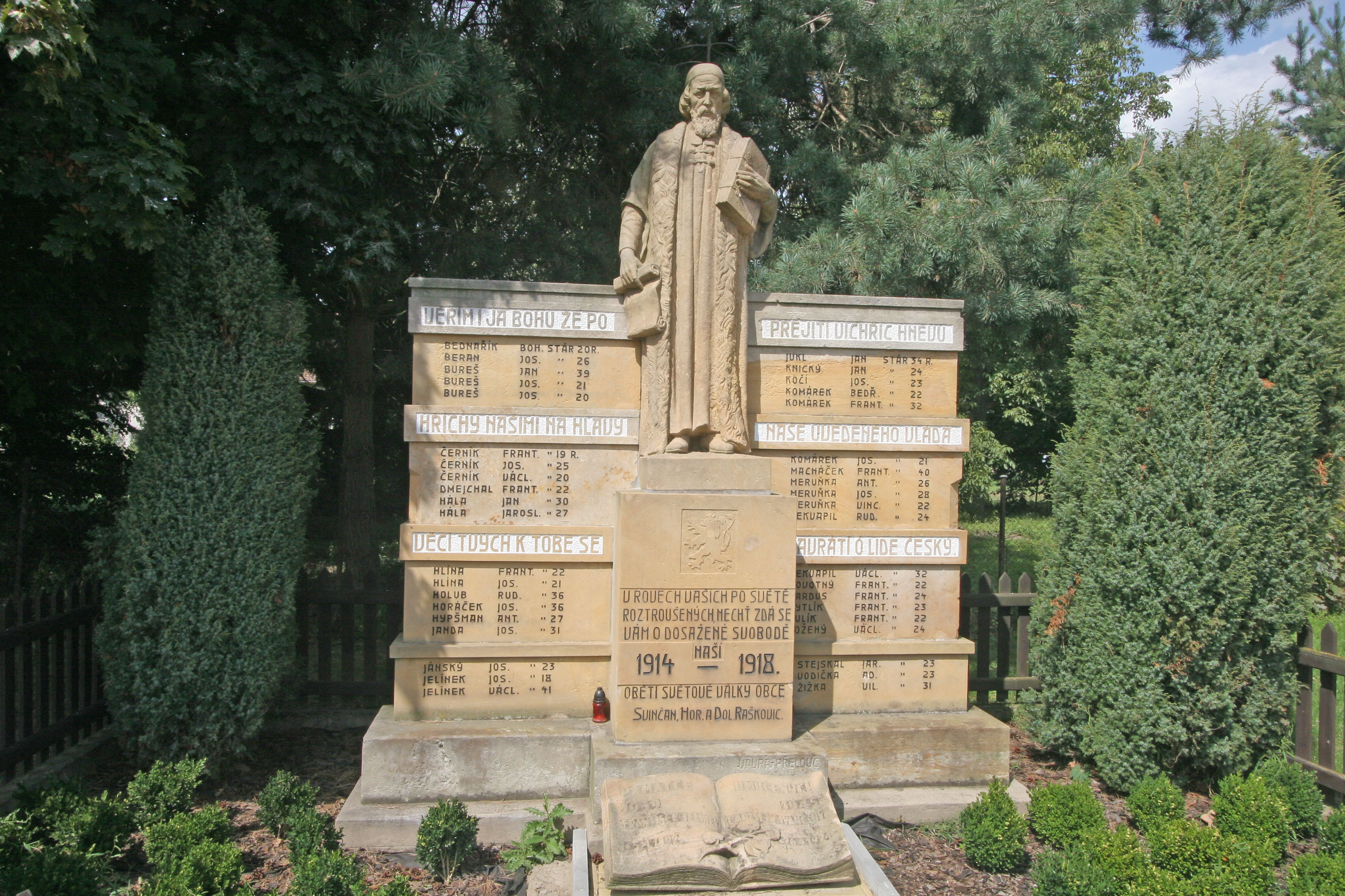 Svinčany pomník padlých